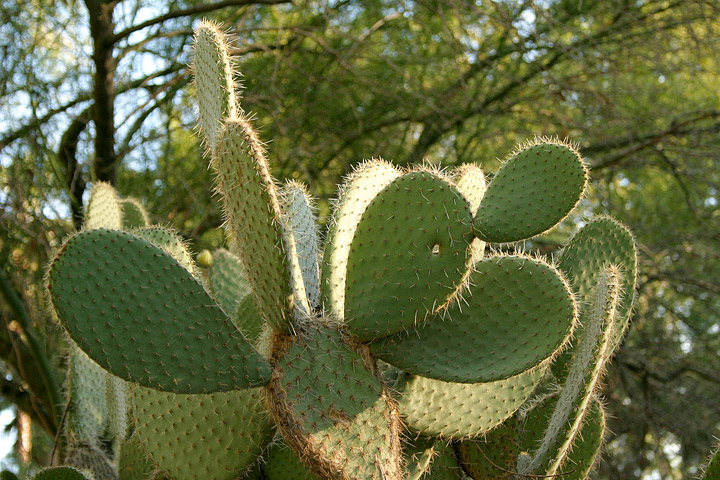 A cactus Species Opuntia aciculata